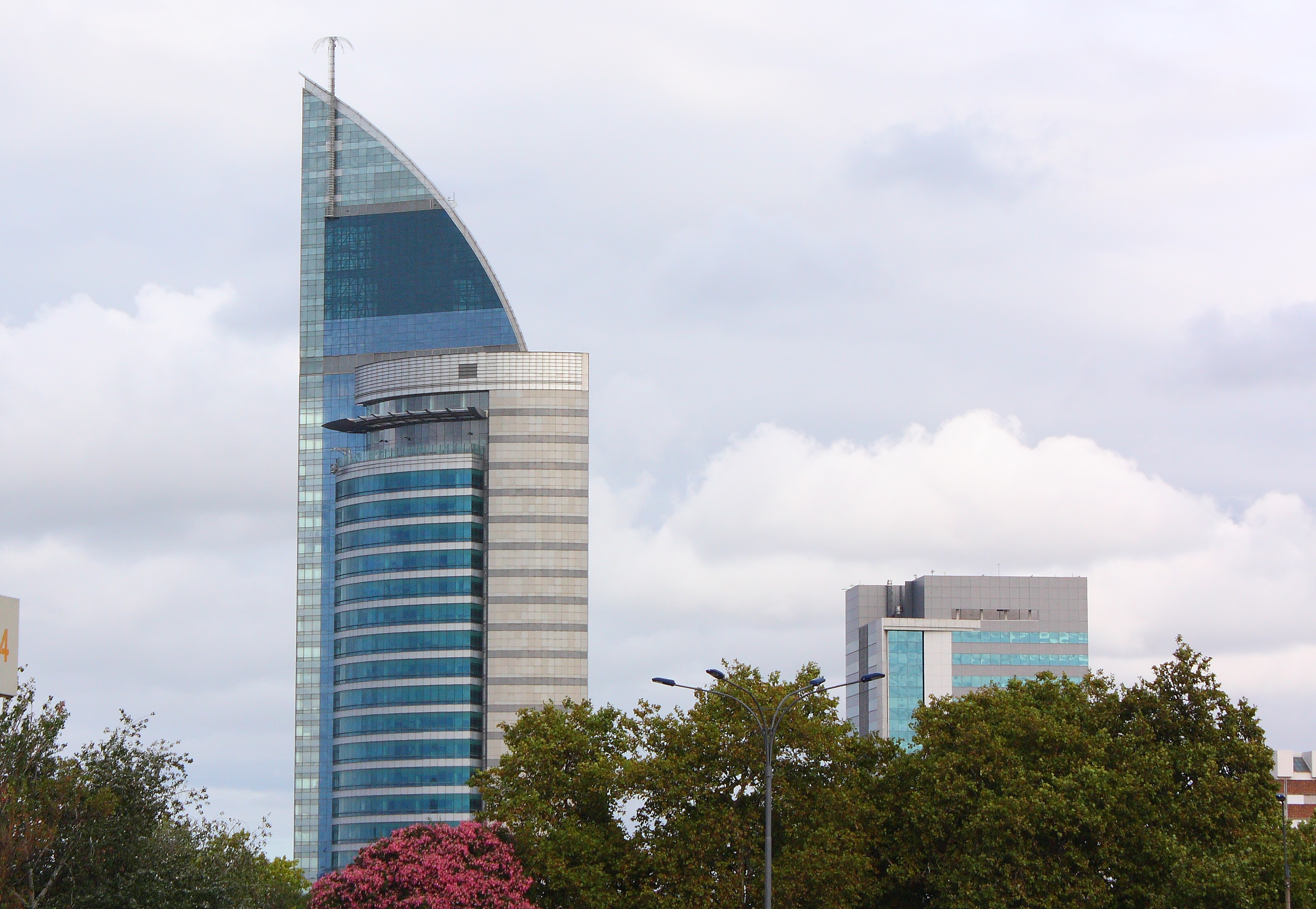 Montevideo, Uruguay